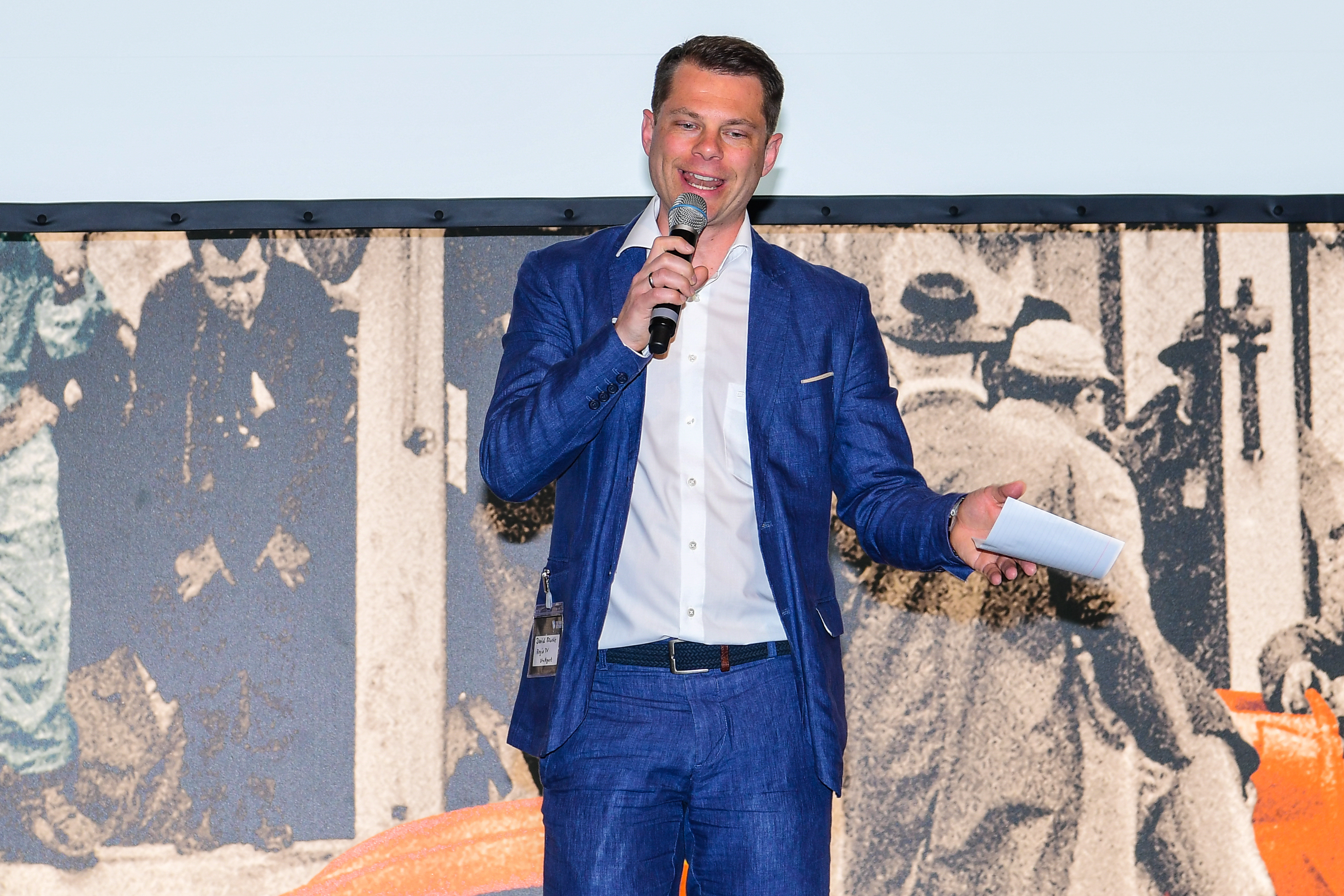 Daniel Räuchle moderiert, Regio TV, Stuttgart